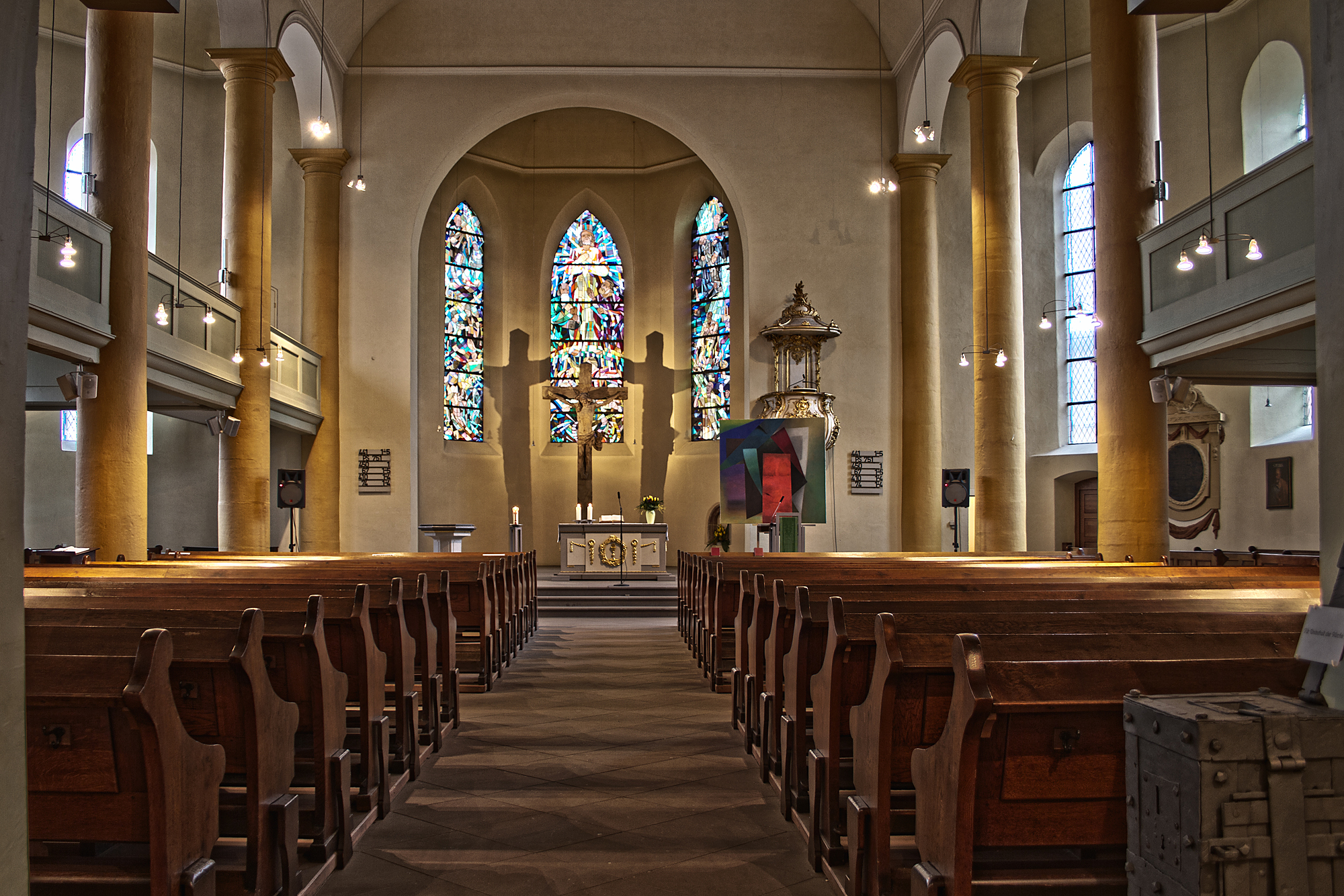 Innenraum der Stadtkirche Durlach